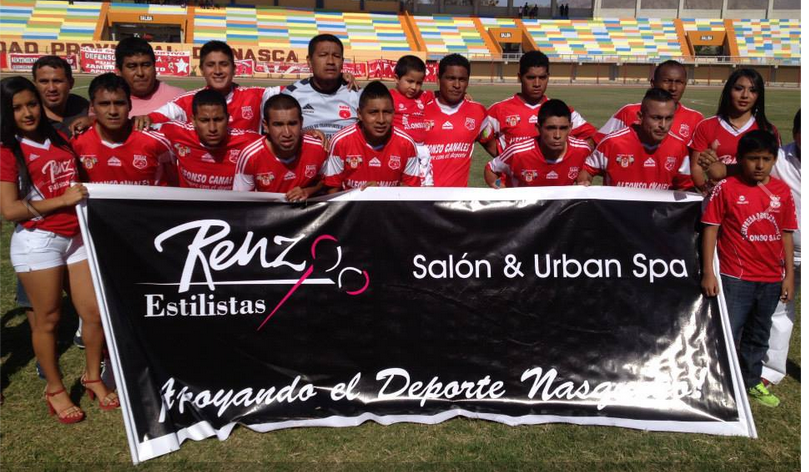 Equipo del Defensor Zarumilla 2014.